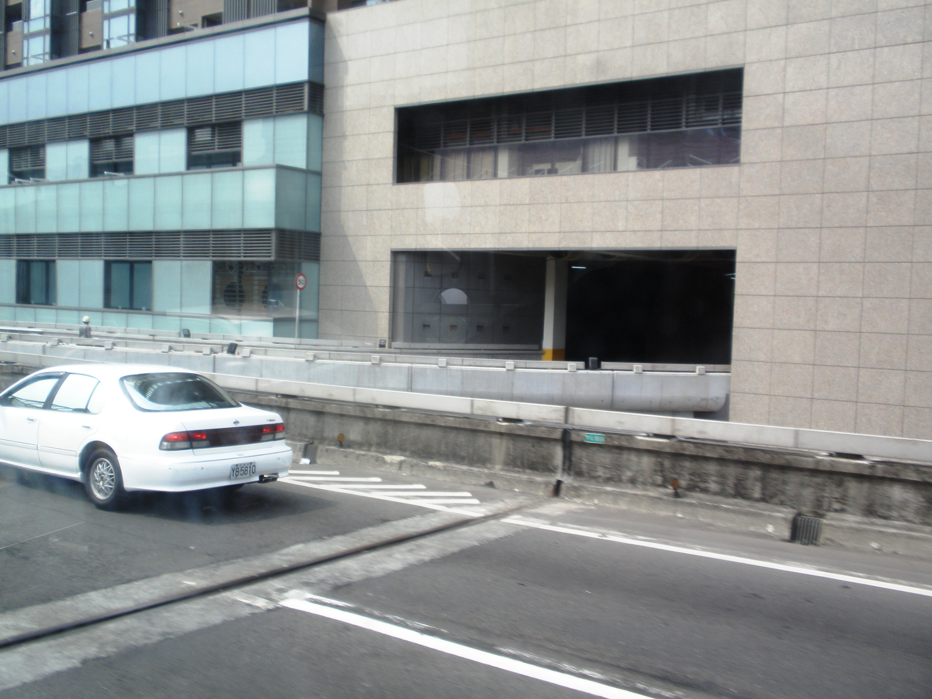 臺北轉運站銜接市民大道高架道路西行車道的出口匝道，攝於臺北聯營公車667路線公車上。